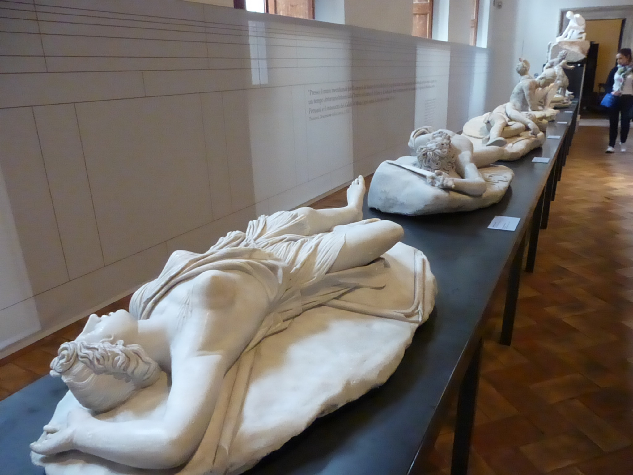 Roma, palazzo Altemps, mostra La gloria dei vinti: le 10 figure del piccolo donario. Si tratta di copie romane di un gruppo statuario dedicato sull'Acropoli di Atene da Attalo I per celebrare la vittoria sui Galati (II sec. a.C.). Le copie romane, di età severiana e provenienti dalla zona del Portico di Ottavia, sono note dal XVI secolo e per la prima volta riunite qui in mostra (si veda il comunicato stampa).